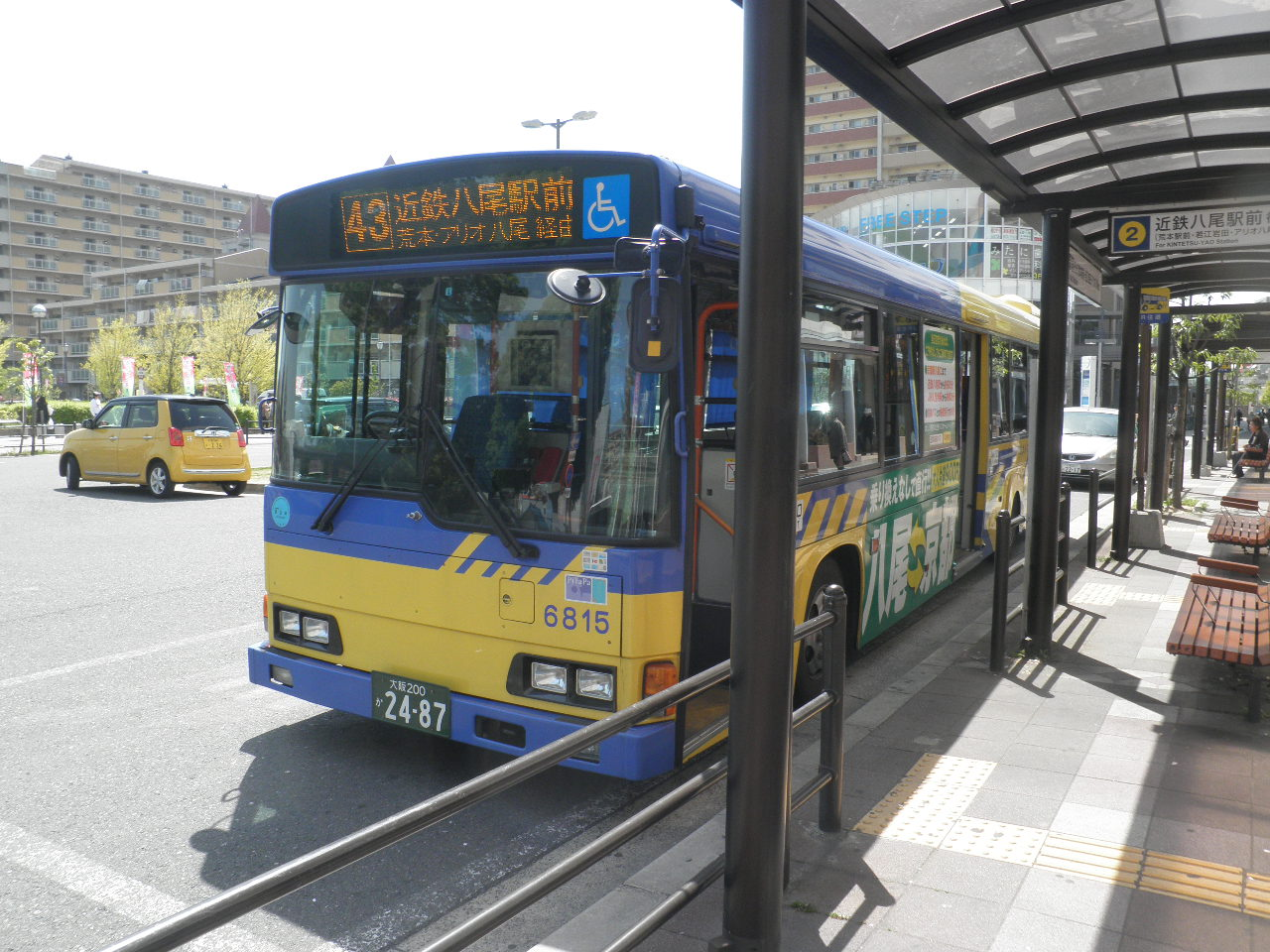 近鉄バス（近鉄八尾駅前行き）